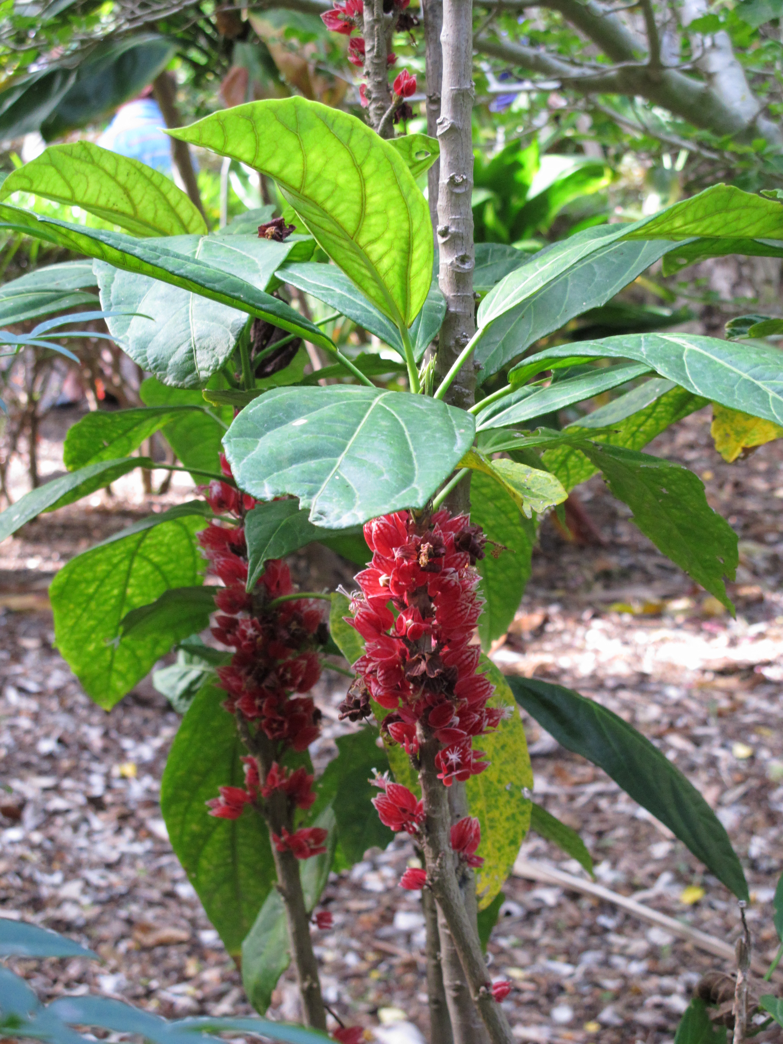 Jardín de Aclimatación de la Orotava, Tenerife, Spain.